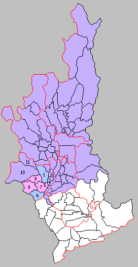 京都府乙訓郡の町村制時点の町村。